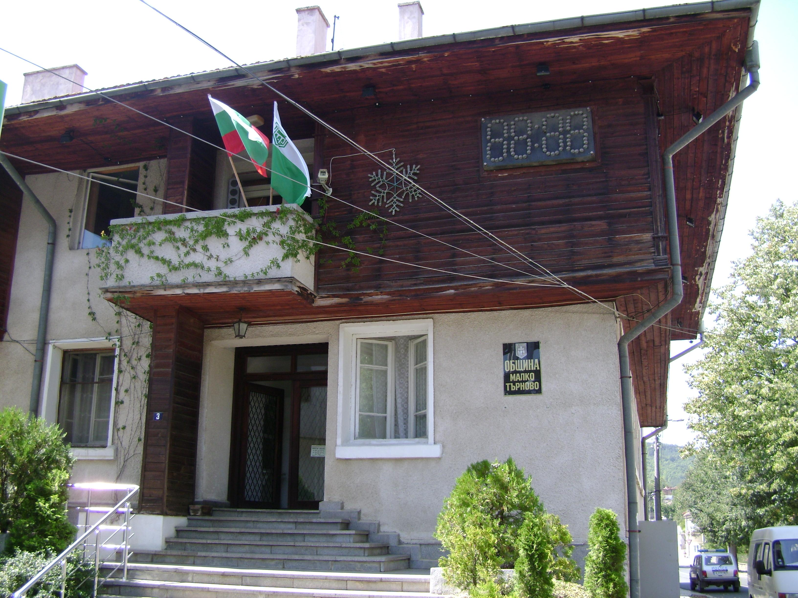 Общината в Малко Търново